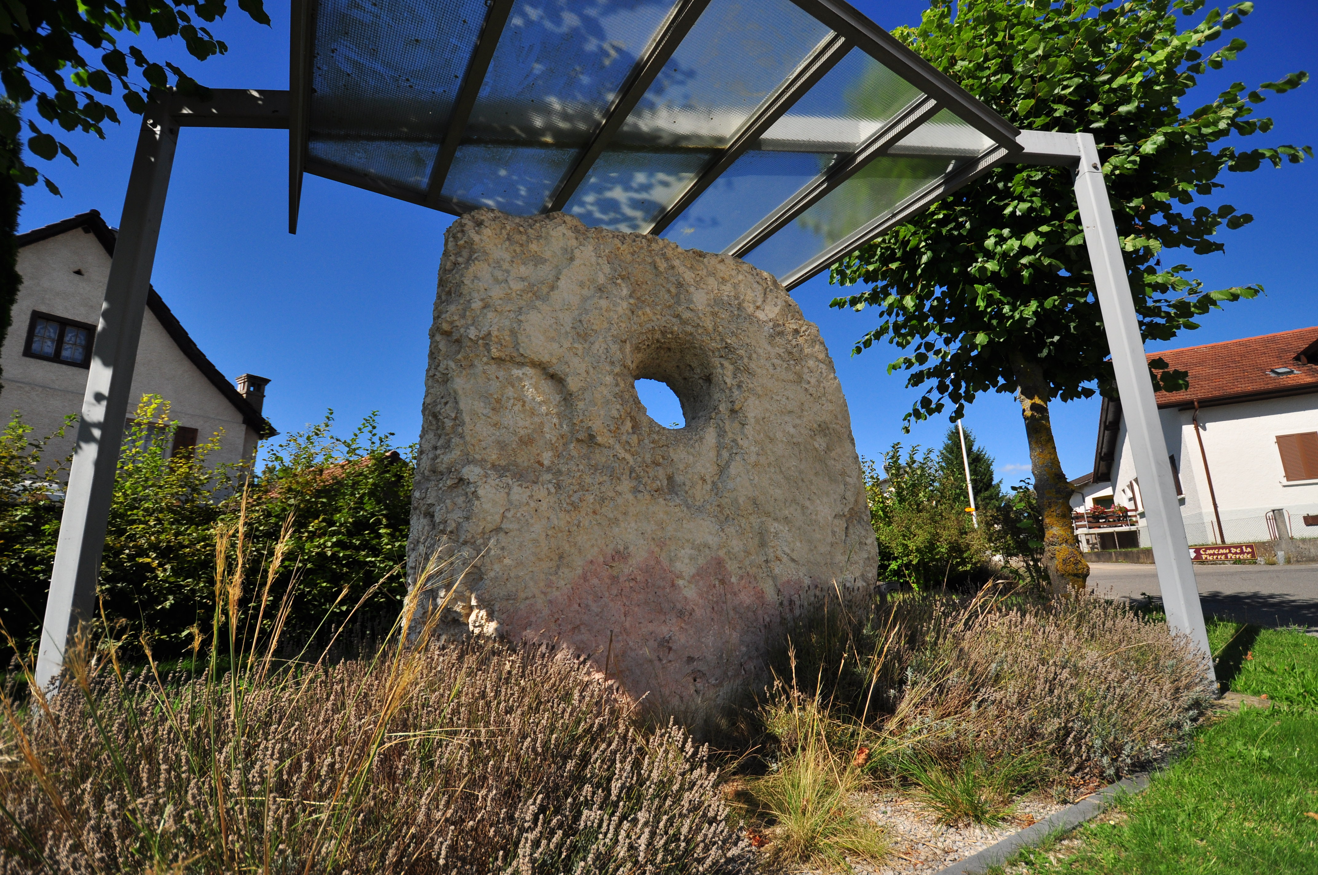 Pierre-Percée (Dolmen néolithique)